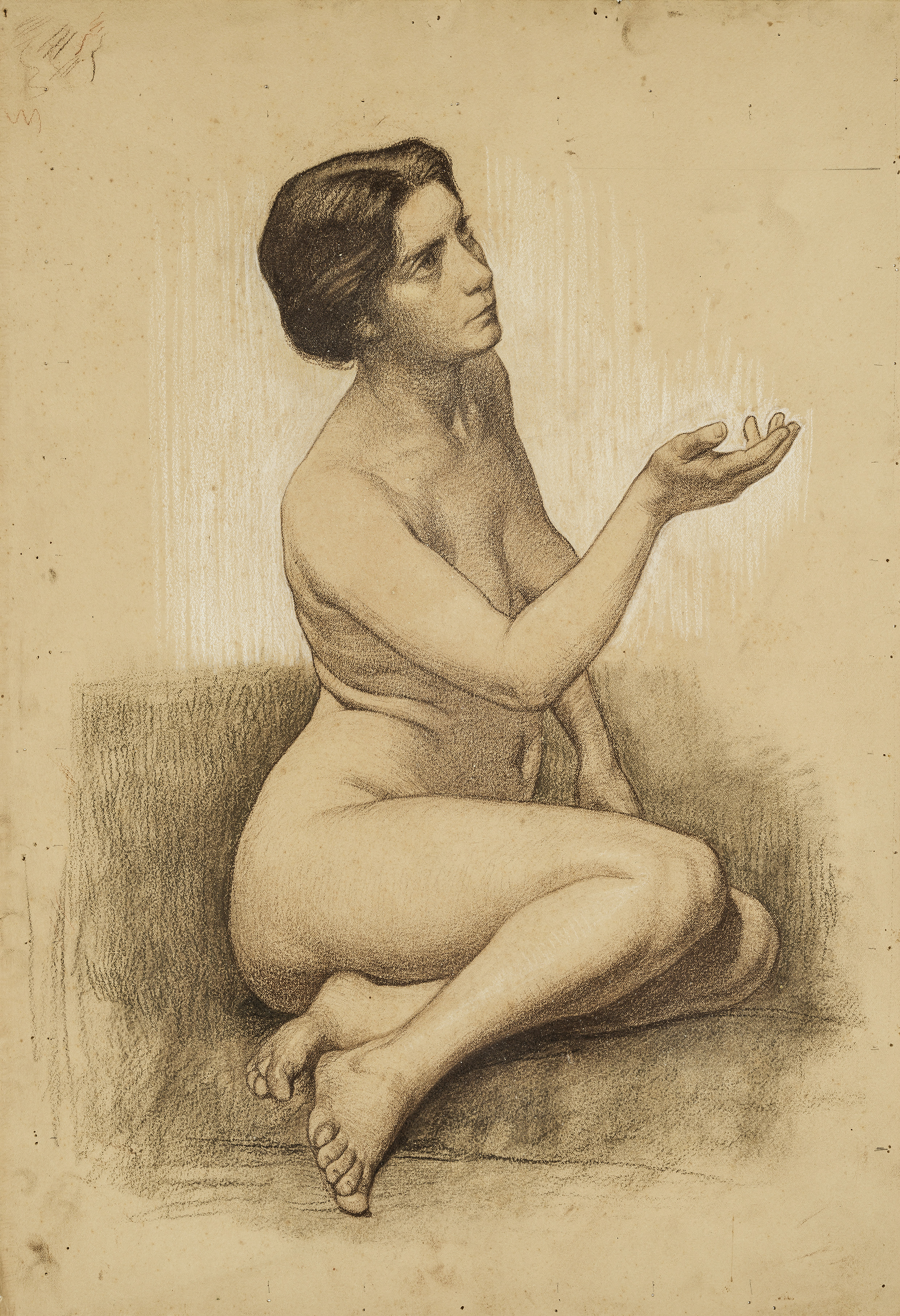 Sigmund Lipinsky: Kniender weiblicher Akt. Kohle, Rötel und weiße Kreide auf Papier, 53 x 36 cm, Die Zeichnung diente als Studie zu dem 1912 vollendeten Gemälde „Die Hesperiden“